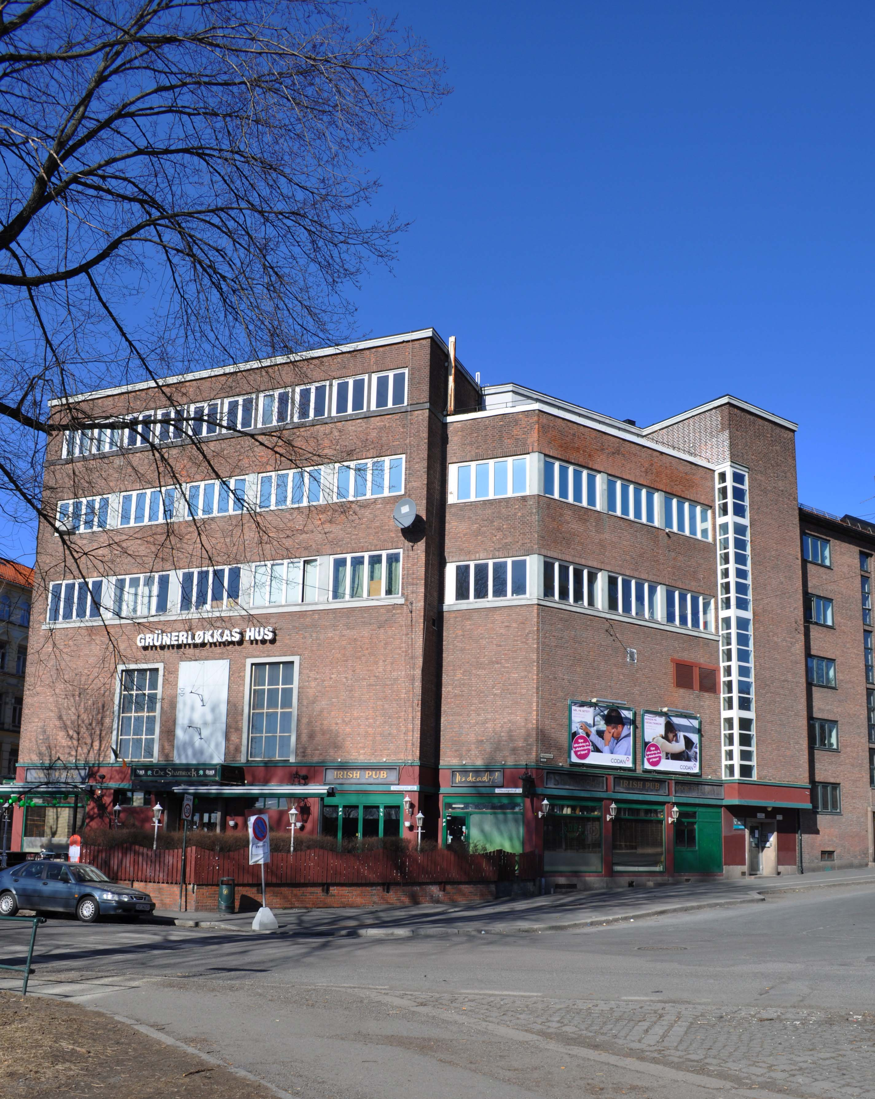 Teater Manu